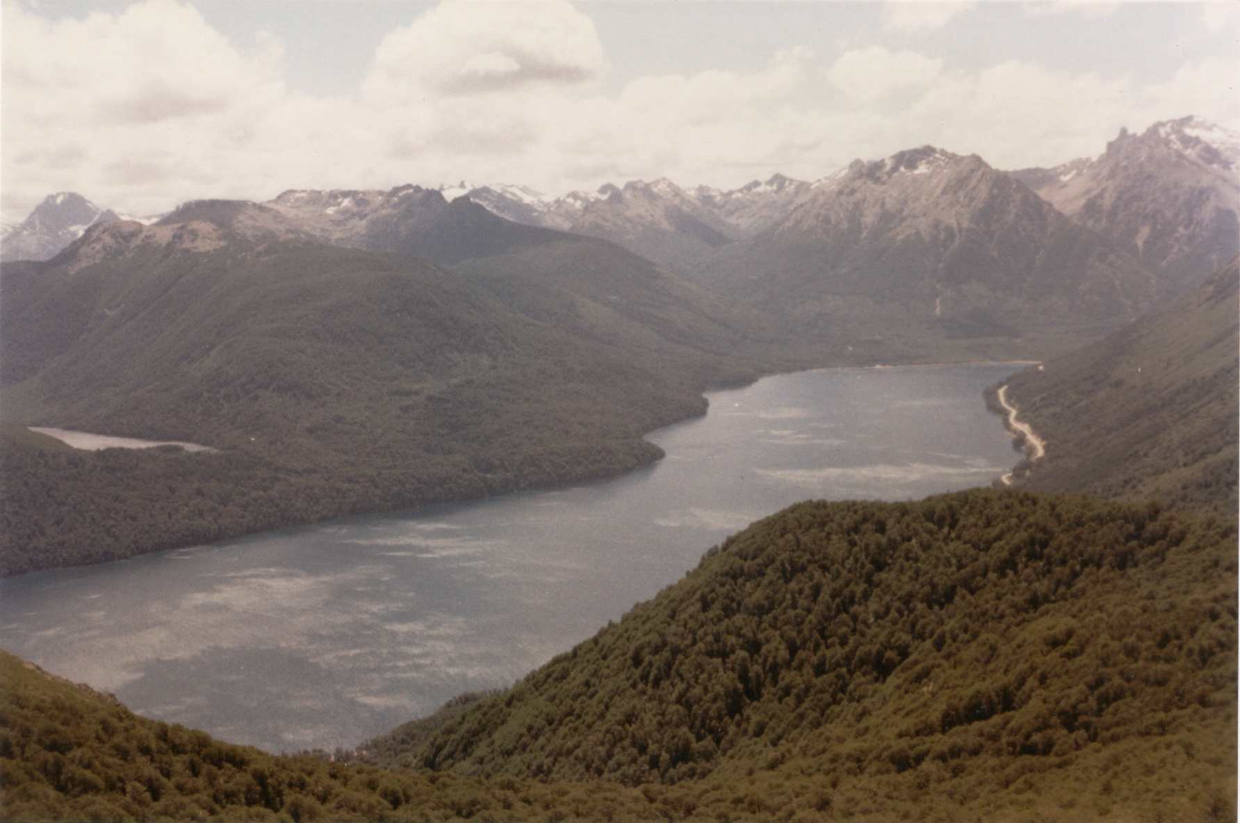 Lagos Mascardi y Llum desde Cerro Latzina (1987)